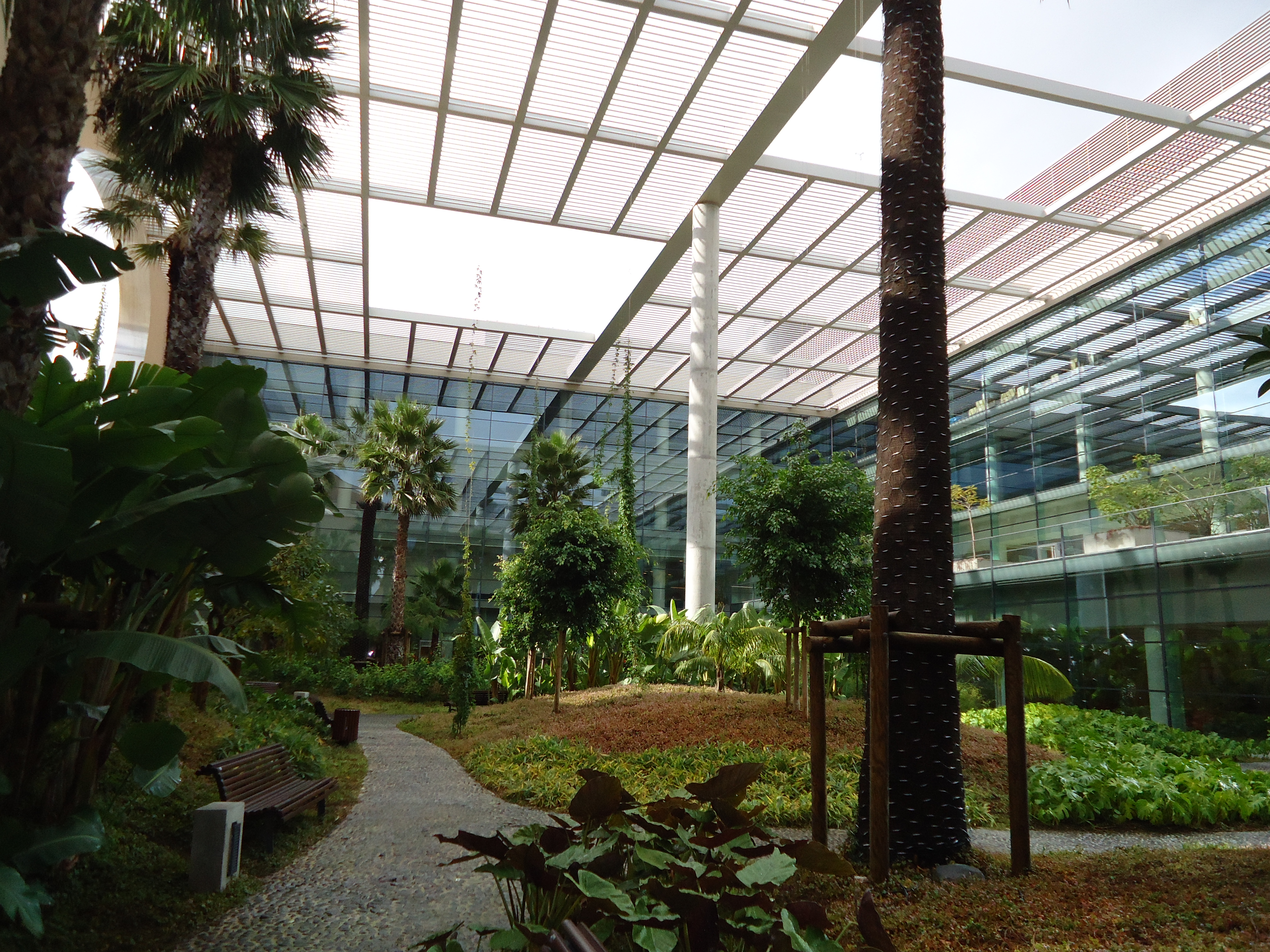 Champalimaud Centre for the Unknown, Lisboa, Portugal: vista interna (jardim tropical).